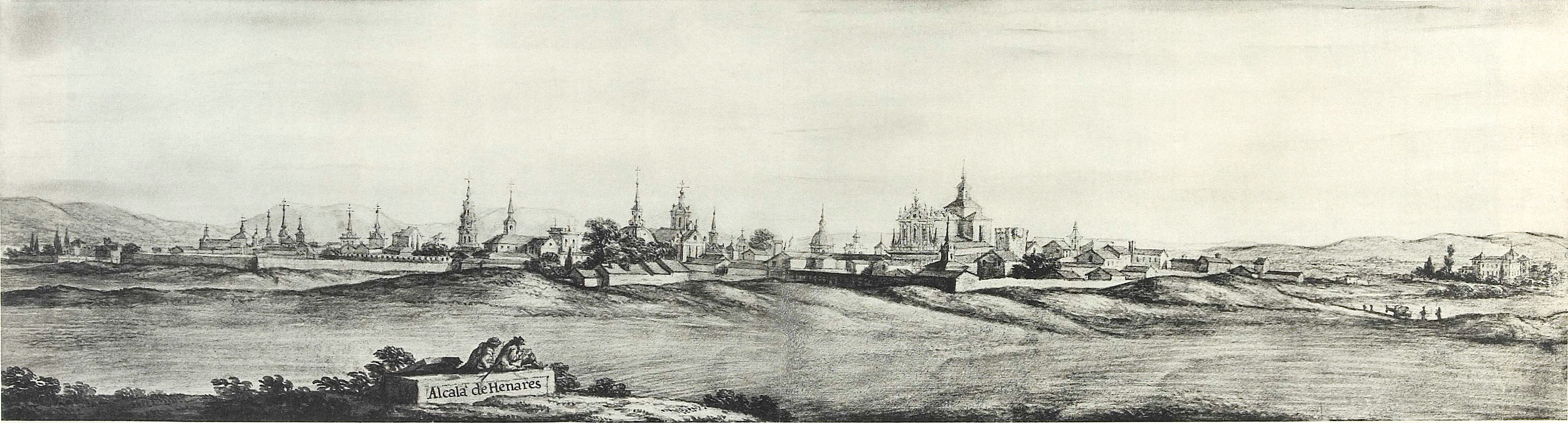 Vista panorámica de Alcalá de Henares (Comunidad de Madrid - España) en 1668, según acuarela de Pier Maria Baldi (Florencia, 1630−1686) durante el viaje a España del Gran Duque de Toscana, Cosme III de Médici (1642-1723).[1]